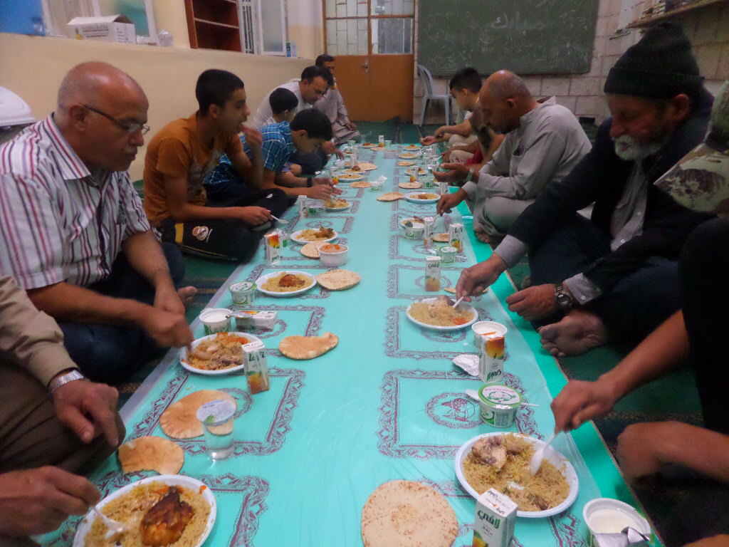 إفطار المسجد